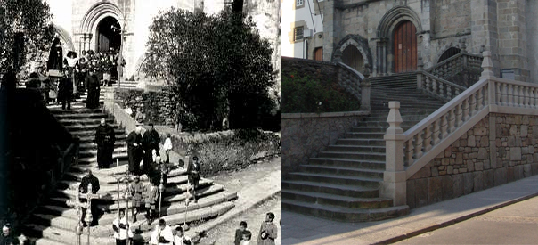 (1927-2010) La iglesia del Convento de San Francisco es el templo principal de la parroquia de Santiago de Viveiro (Lugo). Es una construcción del siglo XIV, con nave única. comenzada por los franciscanos en el siglo XIII. De esta época se conservan 3 arcos descubiertos en la reforma de 1945 y una puerta. El ábside pasa por ser de los más bellos de la provincia. [Nota Mental: Hablar algún día largo y tendido de los ábsides de las iglesias franciscanas] En la capilla de la Orden Tercera se guardan algunos grupos procesionales que hacen de la Semana Santa de Viveiro una de las mejores de Galicia. Cuando en 1927 Ruth Mathilda Anderson llegó a esta villa no pudo por menos que retratar una procesión, la misma que entornando los ojos aún puedo ver bajando la escalinata... algo más aqui